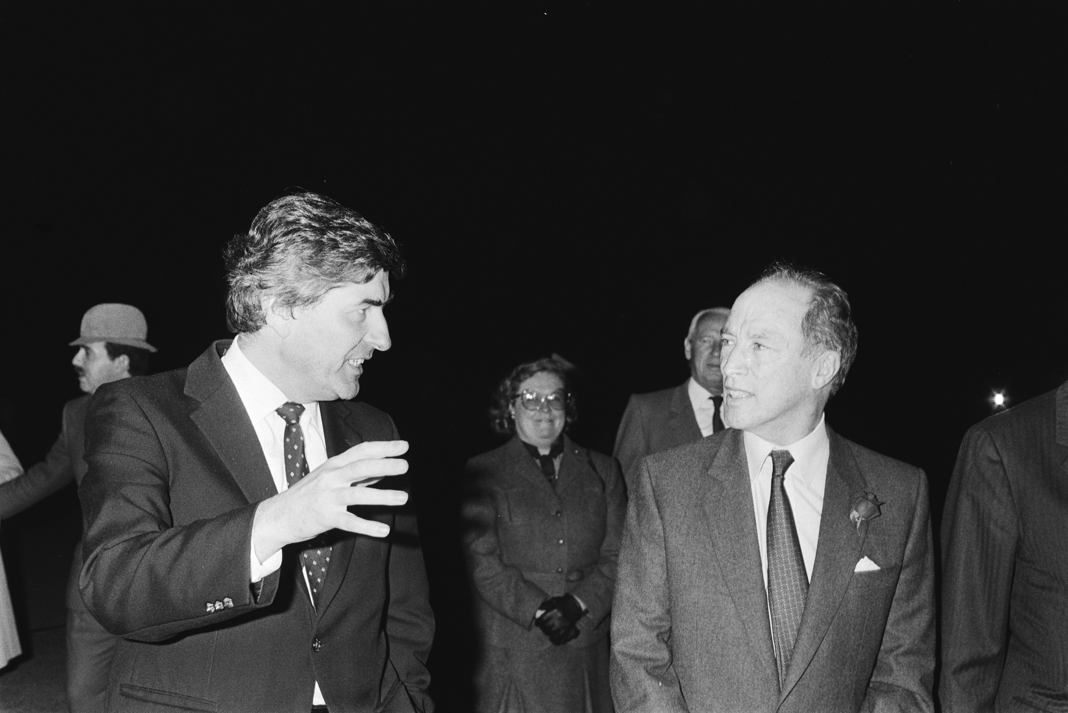 Collectie / Archief : Fotocollectie Anefo Reportage / Serie : [ onbekend ] Beschrijving : Premier Lubbers (l) begroet premier Trudeau van Canada op vliegveld Valkenburg Datum : 8 november 1983 Locatie : Valkenburg, Zuid-Holland Trefwoorden : aankomst en vertrek, ministers-presidenten Persoonsnaam : Lubbers, Ruud, Trudeau, Pierre Fotograaf : Croes, Rob C. / Anefo Auteursrechthebbende : Nationaal Archief Materiaalsoort : Negatief (zwart/wit) Nummer archiefinventaris : bekijk toegang 2.24.01.05 Bestanddeelnummer : 932-7640